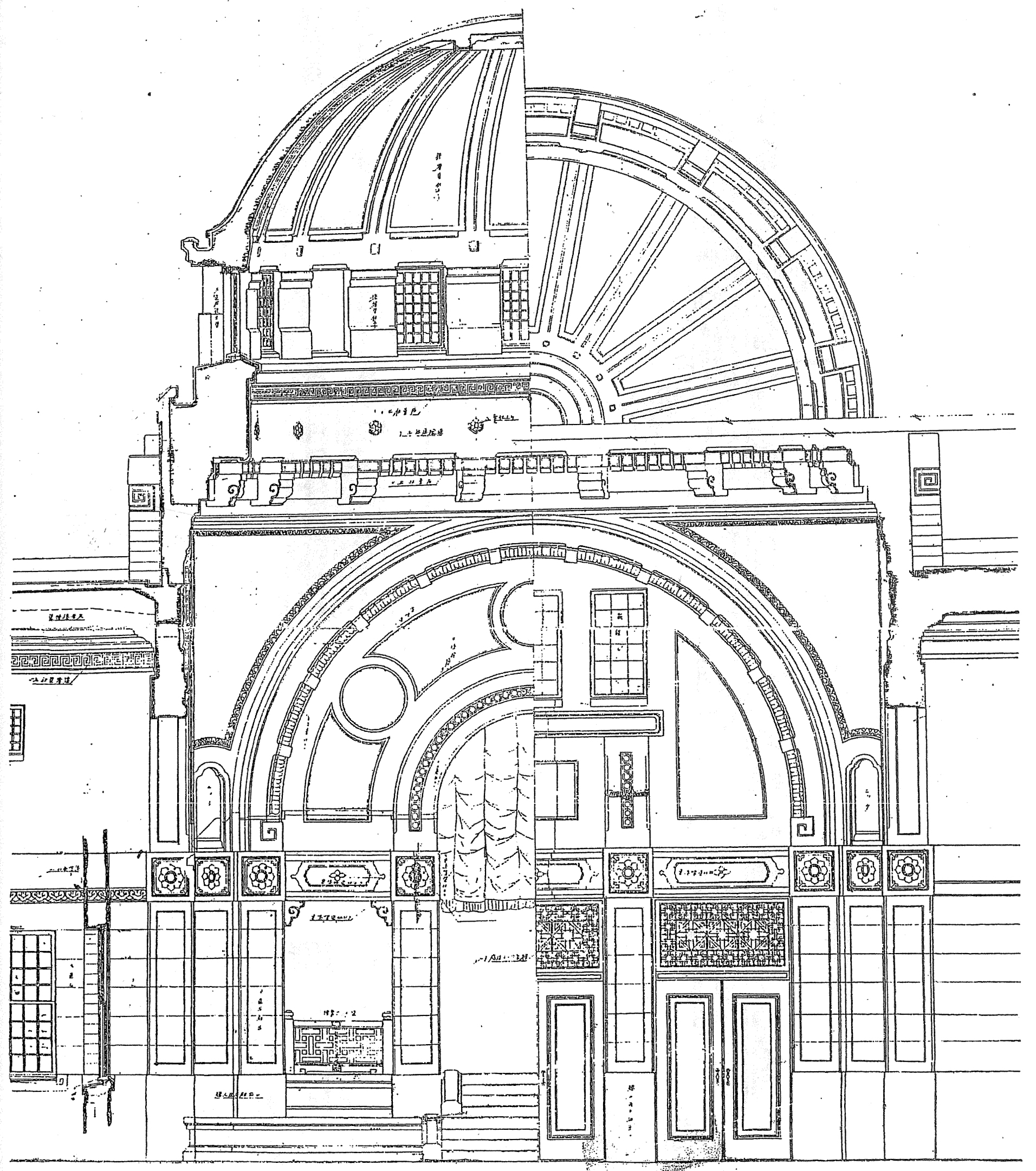 中文（台灣）: 建功神社為臺灣日治時期的建築，由台灣總督府營繕課技手井手薰設計，為一漢、和、洋混和樣式之神社建築。